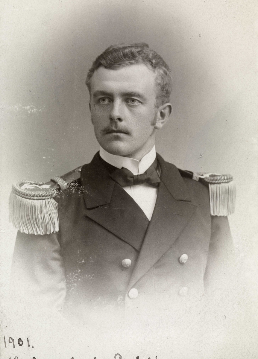 Halfdan Gyth Dehli, portrett, mann, sjøoffiser, flyger, vignettert brystbilde, uniform, epåletter